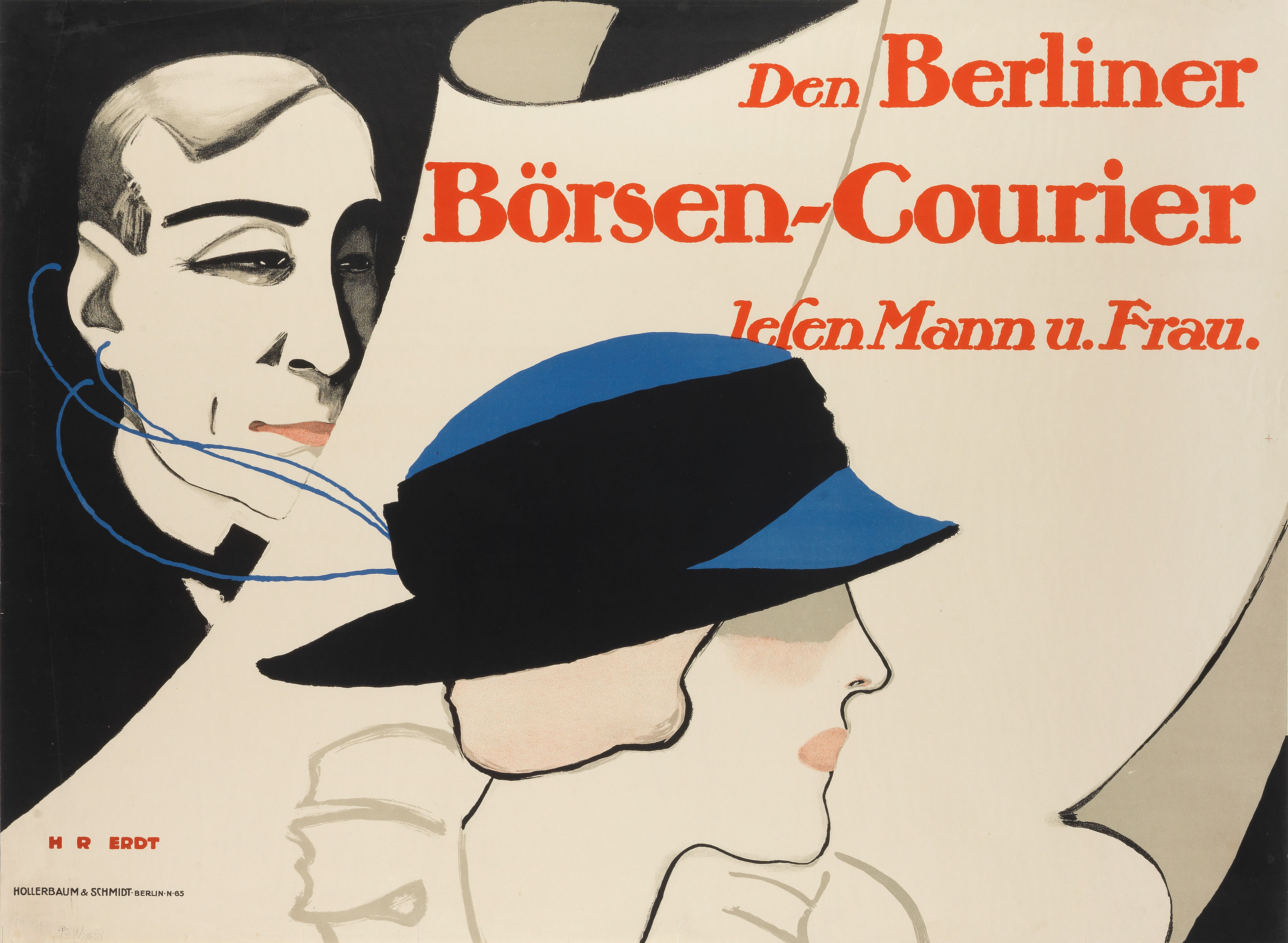 Plakat von Hans Rudi Erdt von 1913: „Den Berliner Börsen-Courier lesen Mann und Frau“ Druck: Hollerbaum & Schmidt, Berlin ...